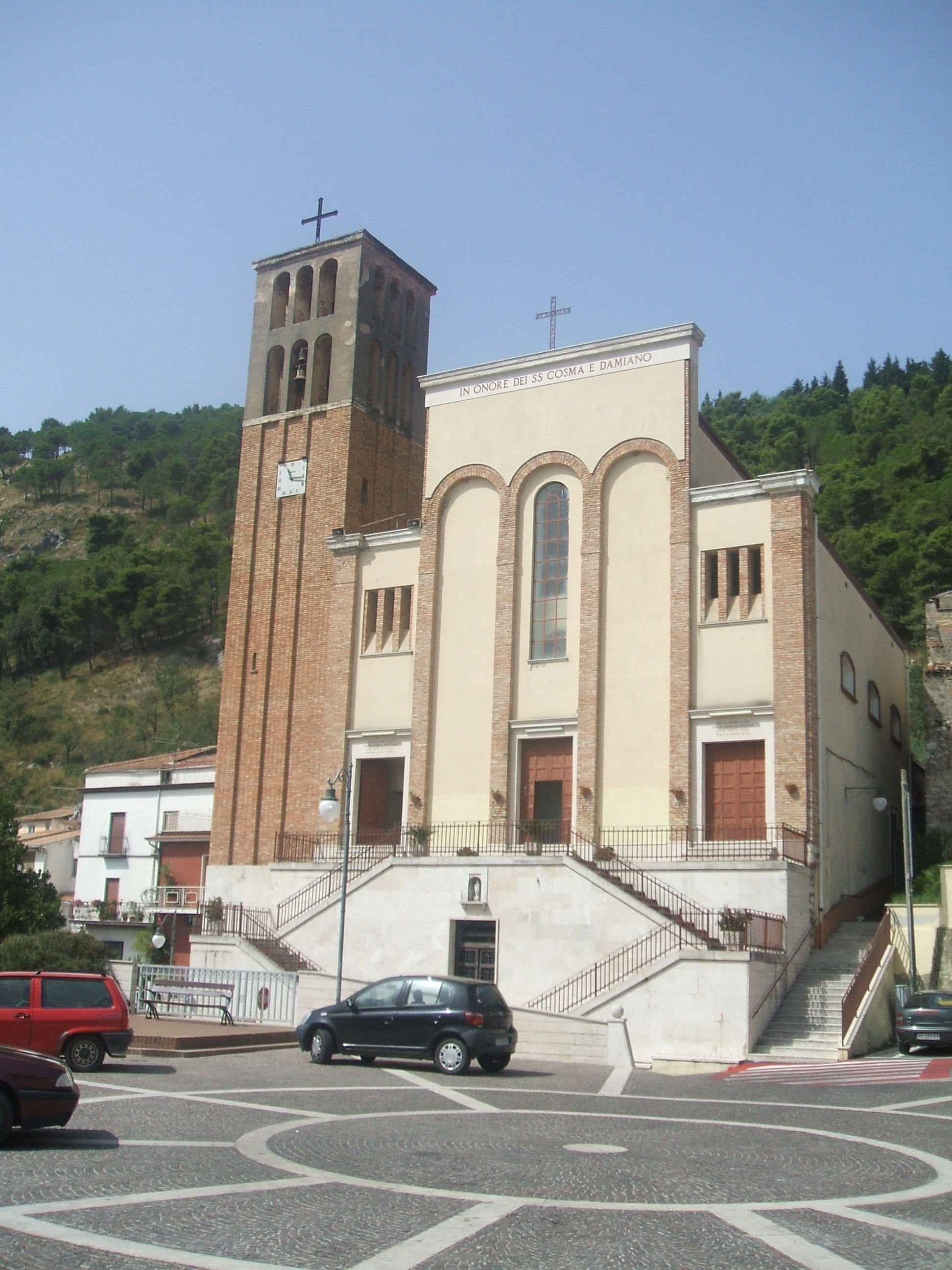 Main church in Santi Cosma e Damiano (LT), Provincia di Latina, Regione Lazio (Latina Province, Latium Region, Italy).